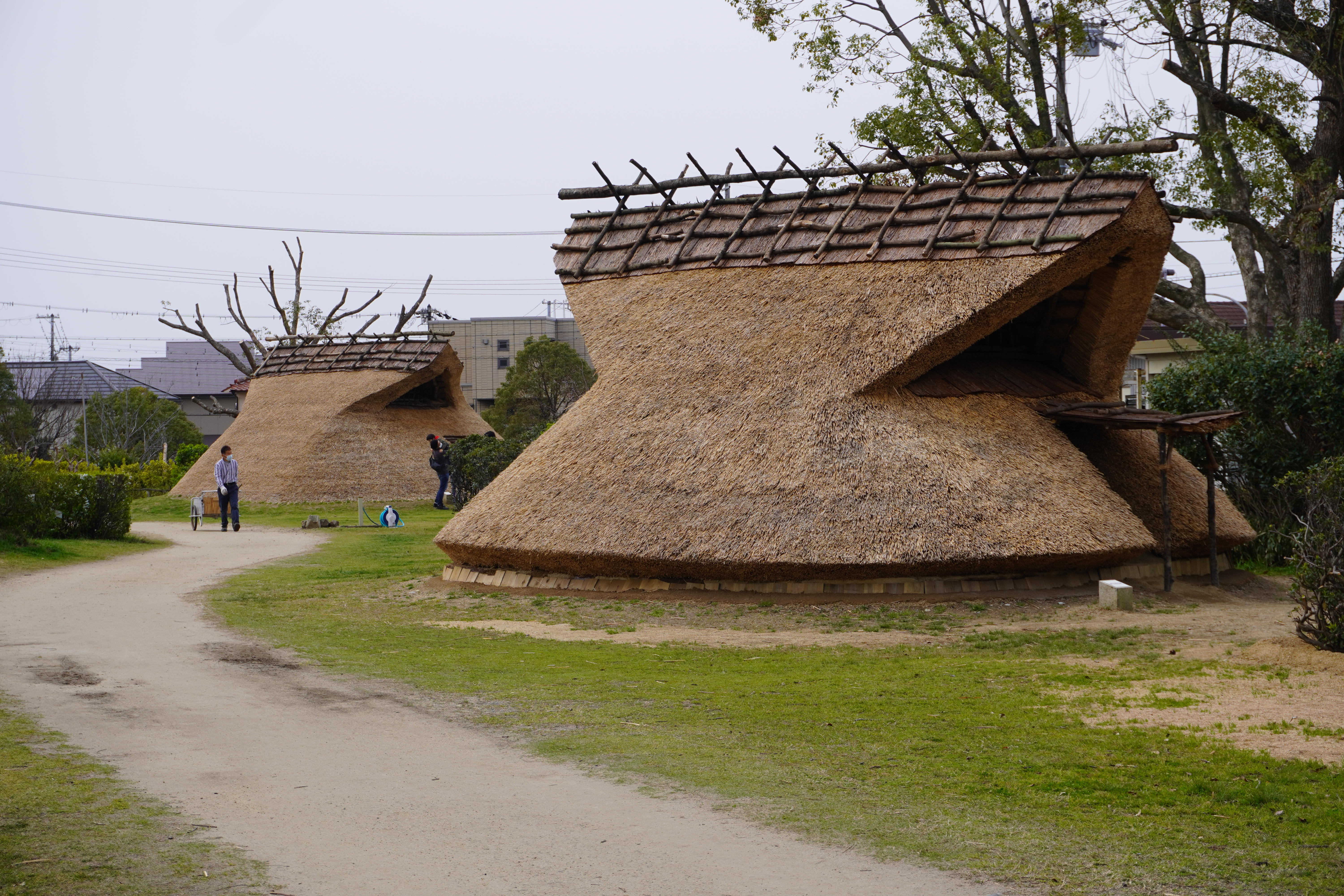 大中遺跡復元住居